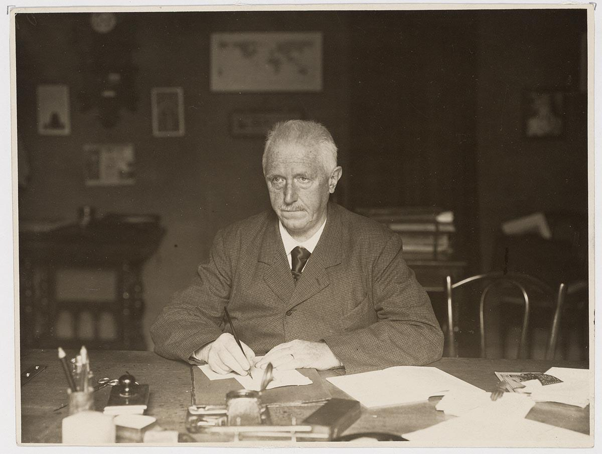 Henri Hubert van Kol